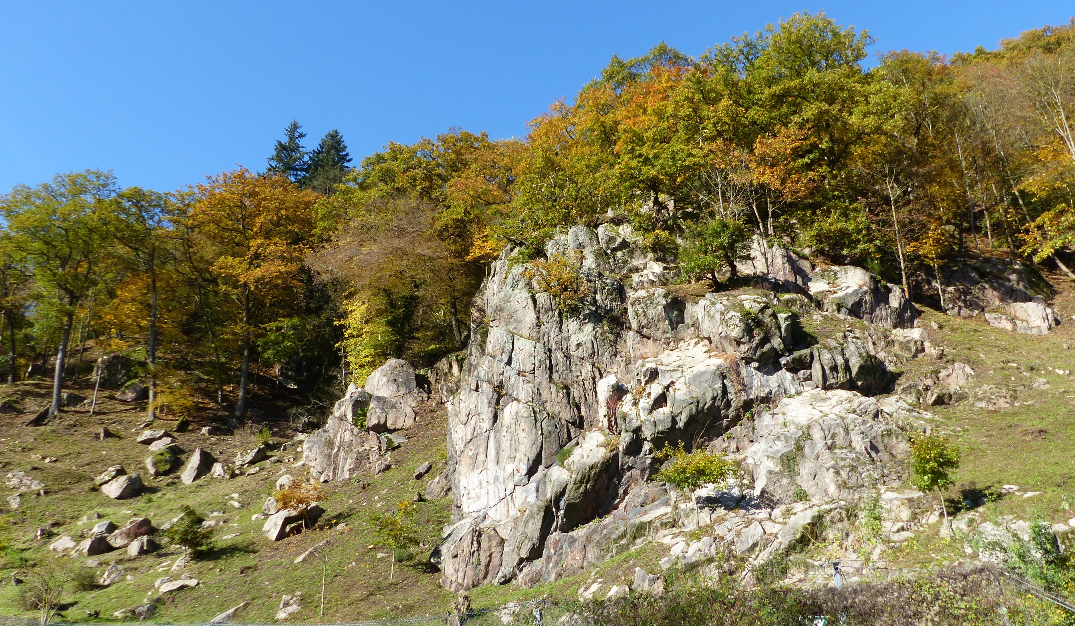 Granitfelsen Russenstein bei Heidelberg, Naturdenkmal